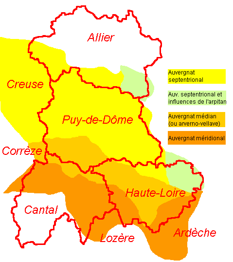 Aire géographique de l'auvergnat. Sources Bonnaud Pierre, De l'Auvergne : un fil d'Ariane pour aller de la Confédération Arverne au IIIe millénaire, éditions Créer, Nonette 2003. ISBN : 2-84819-001-9. (aperçu limité en ligne) Bonnaud Pierre, Introduction générale à l'onomastique d'après l'exemple du fichier onomastique de l'Auvergne (FOA), Annales du centre régional de documentation pédagogique de Clermont-Ferrand, Centre régional de documentation pédagogique (CRDP), Clermont-Ferrand 1979. Bonnaud Pierre, Nouveau dictionnaire général français-auvergnat, Éditions Créer, 1999 (ISBN 2-909797-32-5) (aperçu limité en ligne). Bonnaud Pierre, Grammaire générale de l’auvergnat à l’usage des arvernisants, coll. Eubransa /Travaux, Cercle Terre d’Auvergne, Chamalières 1992.